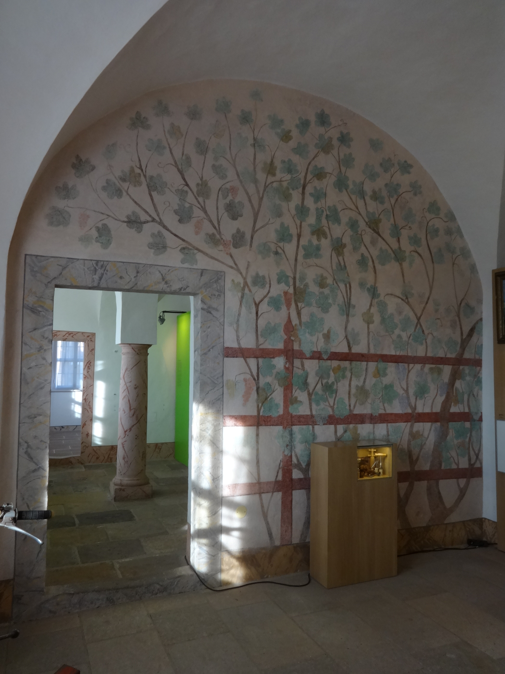 Ausstellungsräume Hoflößnitz, Radebeul